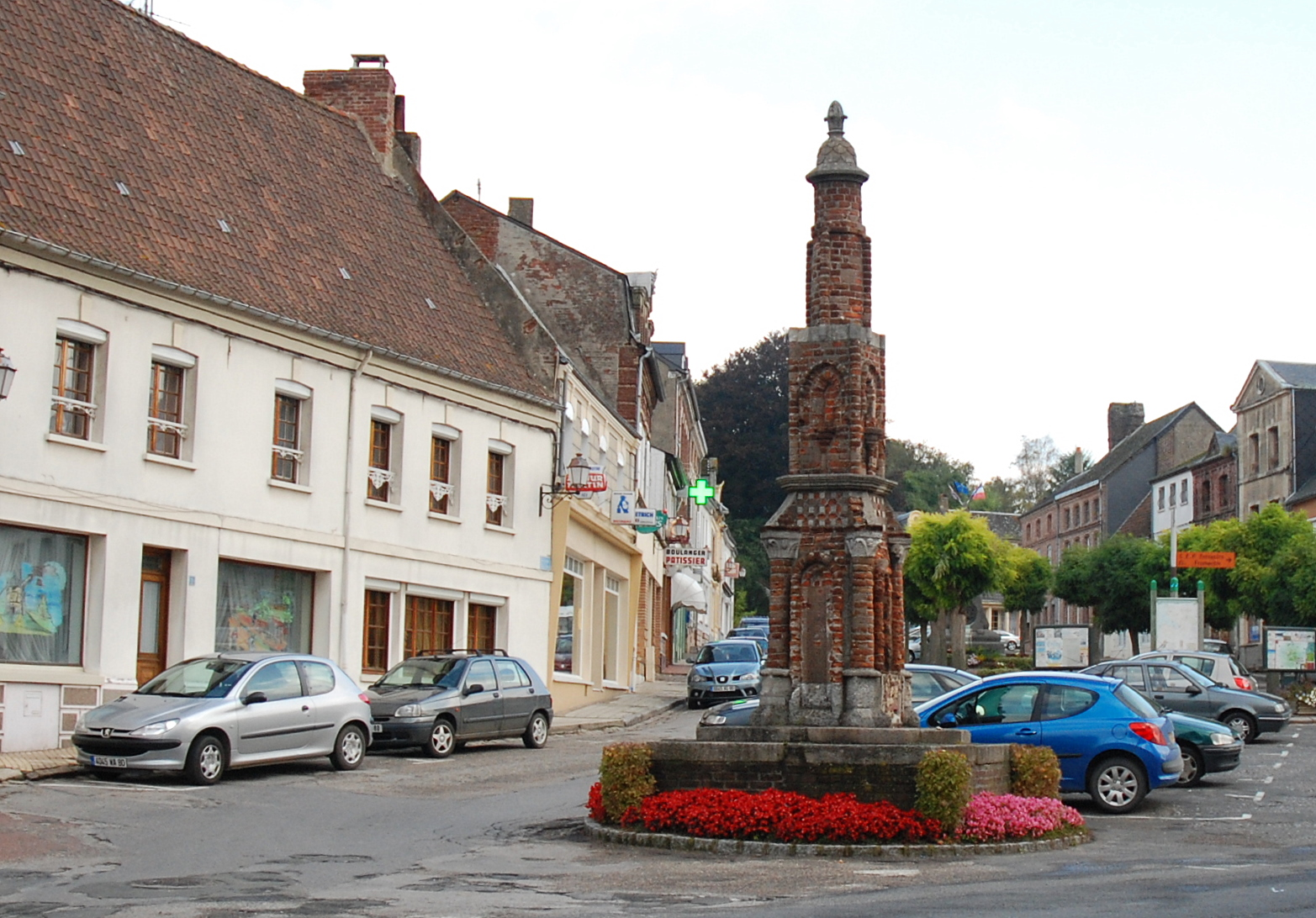 Bakstenen zuil, die door Eleonora van Aquitanië in 1189 zou opgericht zijn voor haar twee zonen (Richard I Leeuwenhart en zijn broer Jan zonder Land). Eleonora was koningin van Engeland en gravin van Ponthieu